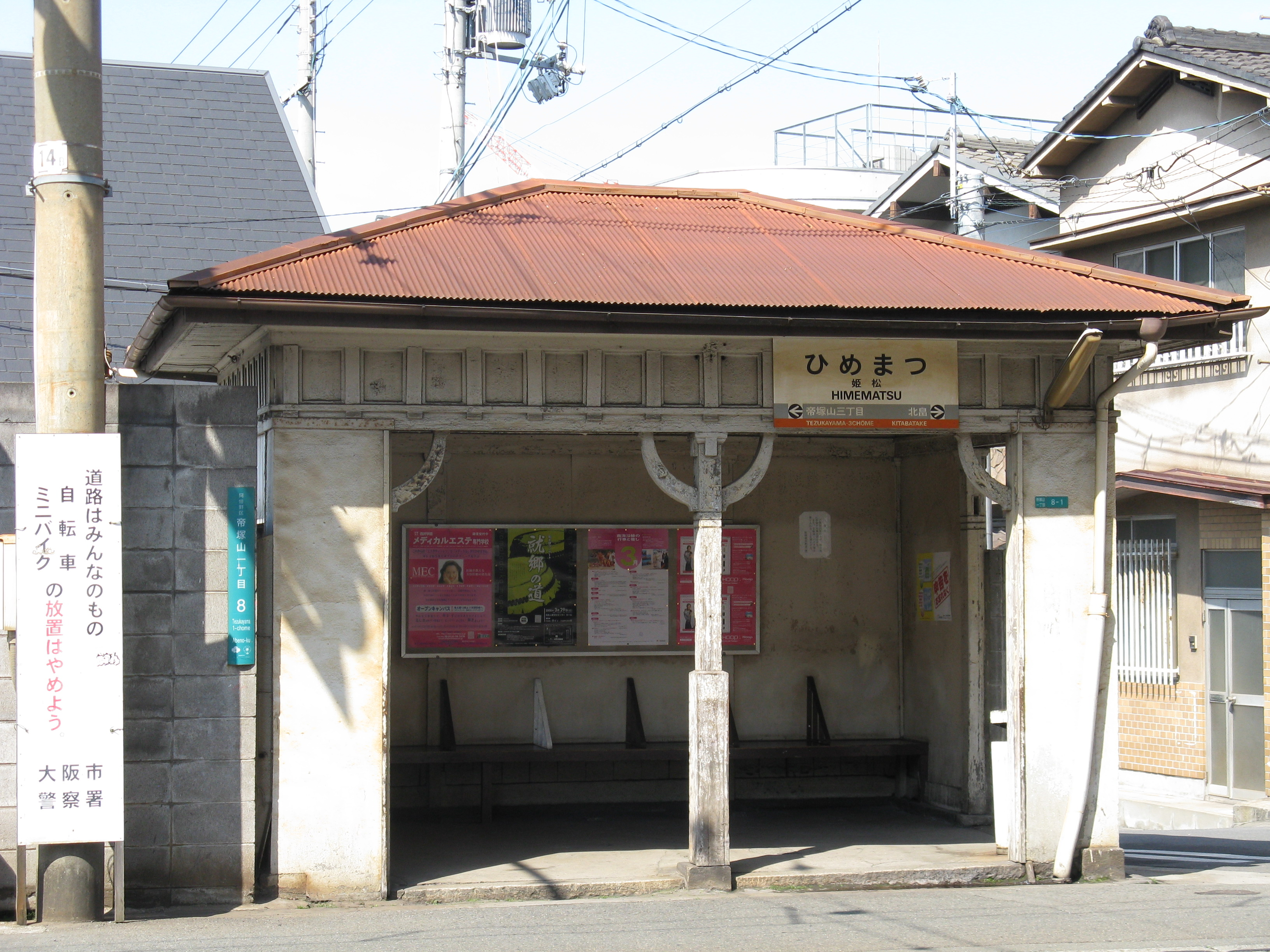 姫松駅 待合室